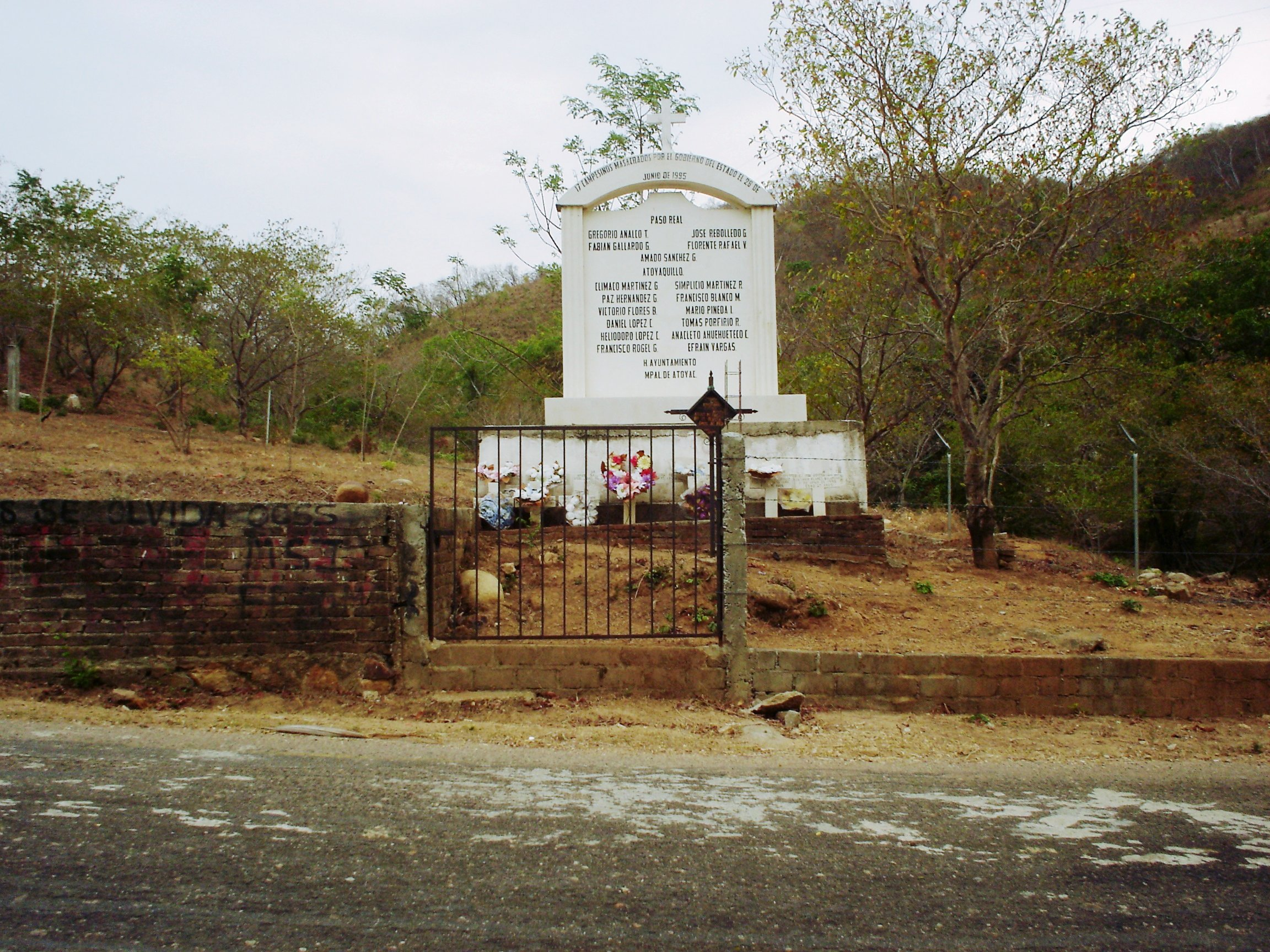 Vado de Aguas Blancas, municipio de Coyuca de Benítez, Guerrero, México donde tuvo lugar la masacre de 17 campesinos de la OCSS (Organisaciòn Campesina Sierra del Sur) el 28 de junio de 1995.